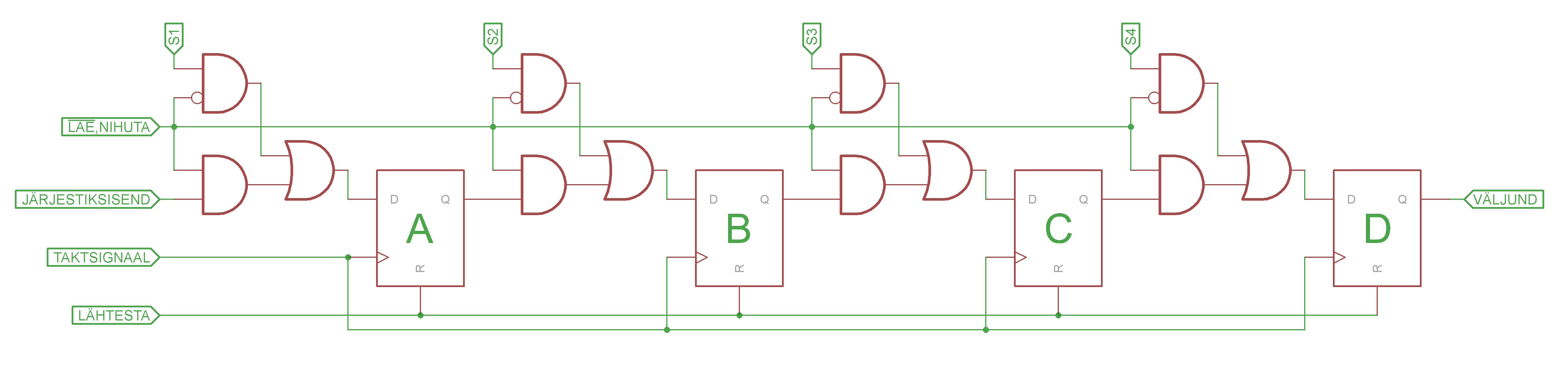 D-trigeritest koostatud paralleelsisend järjestikväljund nihkeregister